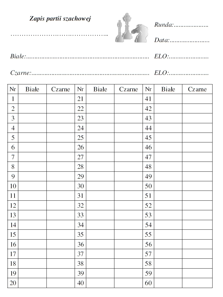 Zapis partii szachowej. Autor wzoru: Paweł Jaroch.